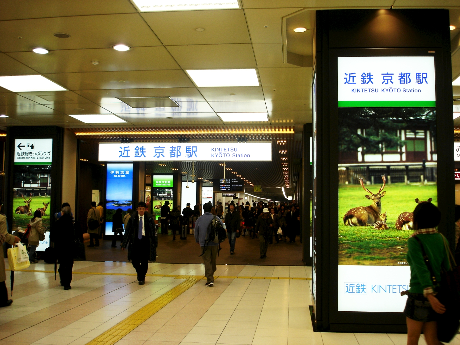 2008年12月10日撮影の近鉄京都駅改札口。